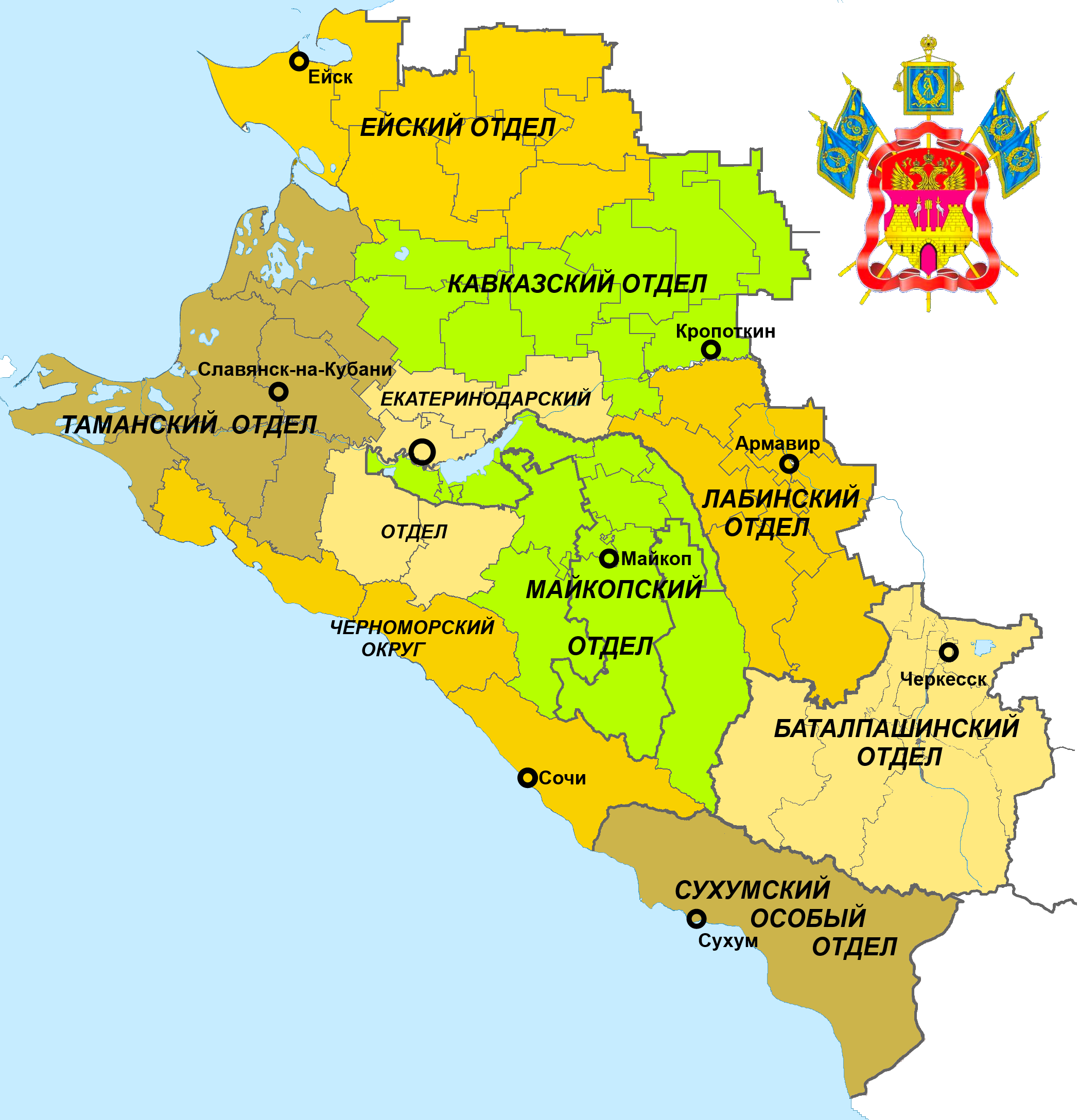 ВКО «Кубанское казачье войско»(Kuban cossack army)